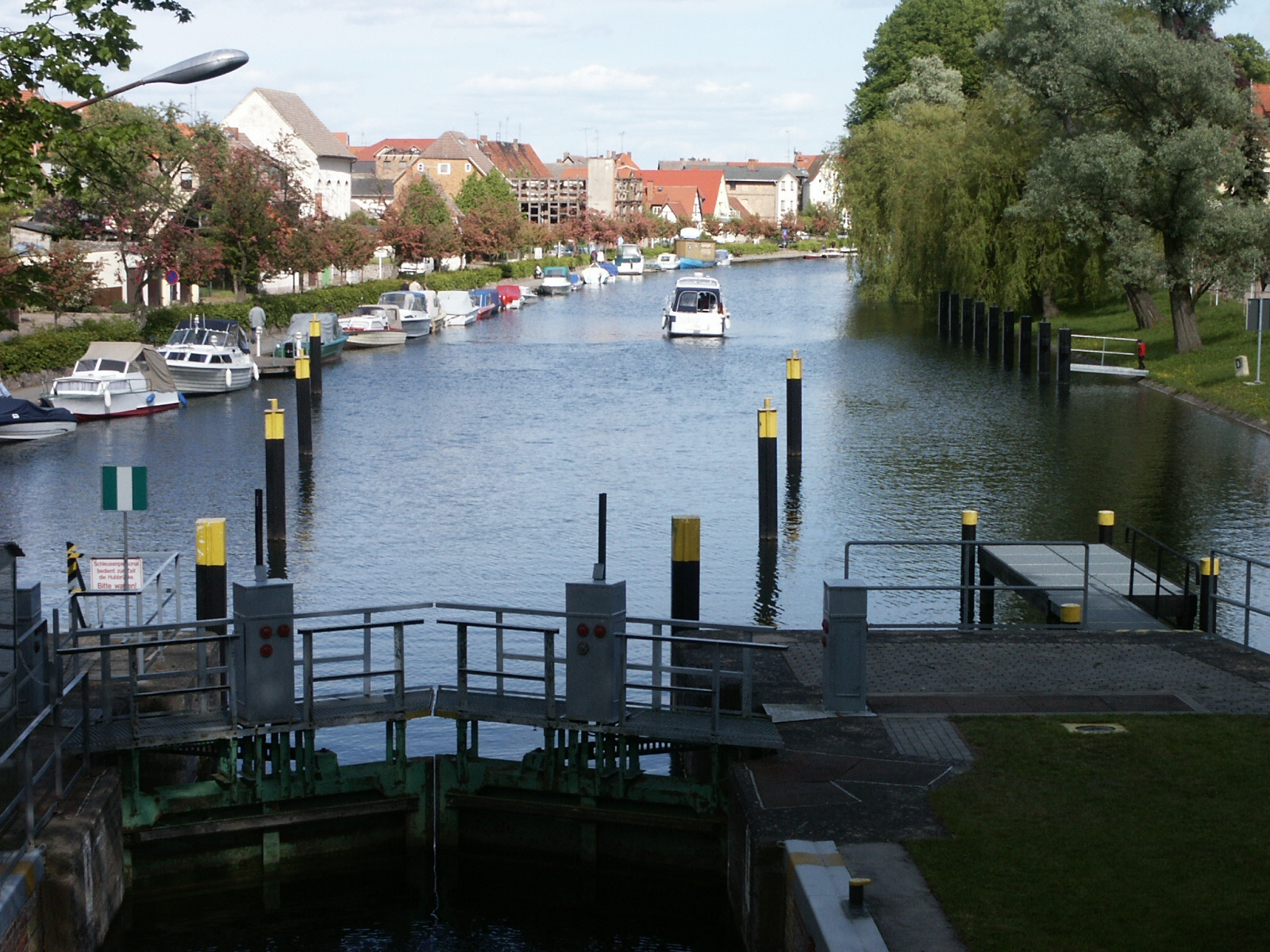 Plau am See, Eldeschleuse Blickrichtung Hubbrücke